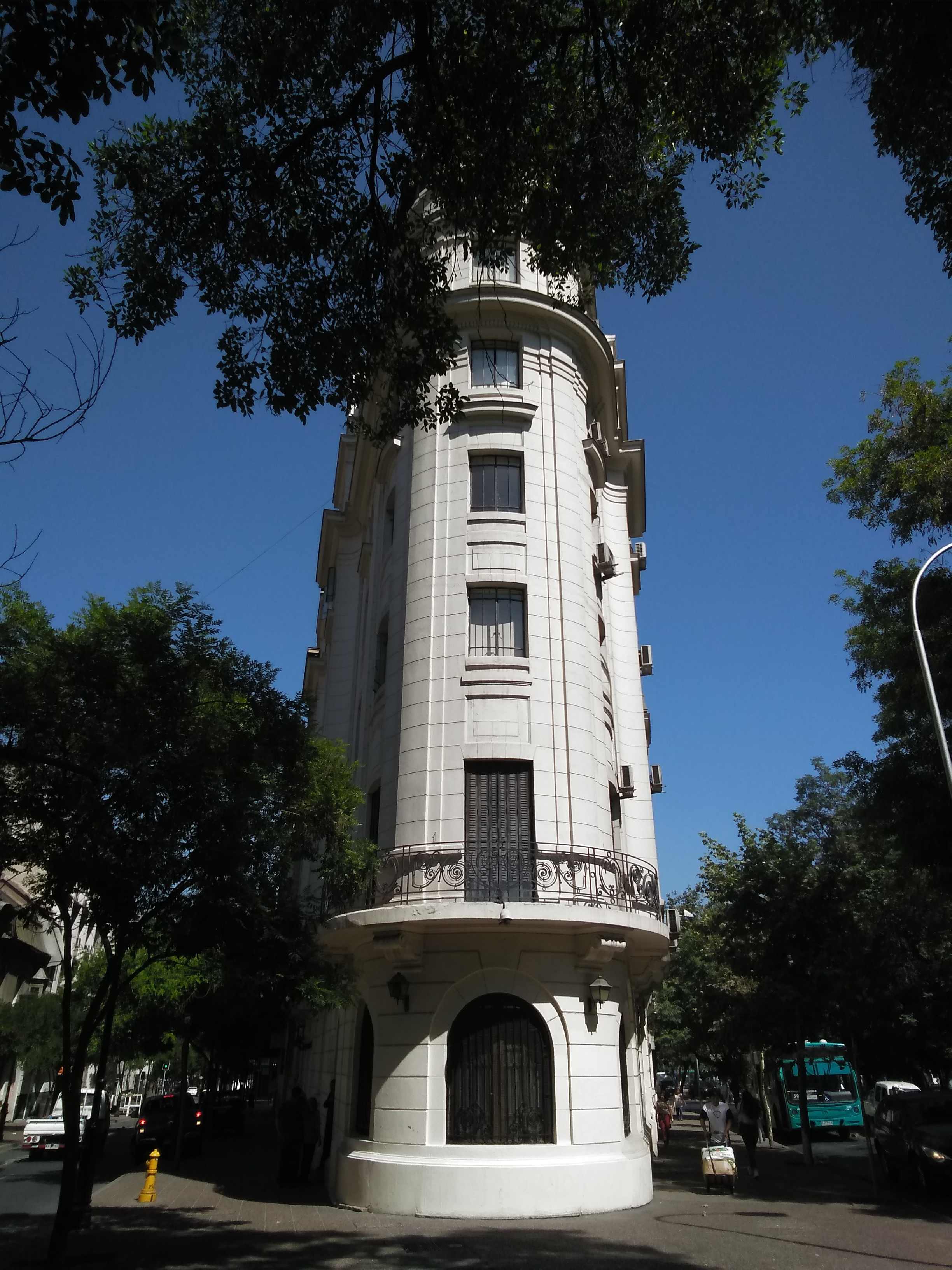 Edificio de la sede nacional del Servicio Electoral de Chile. Esmeralda 611, Santiago.